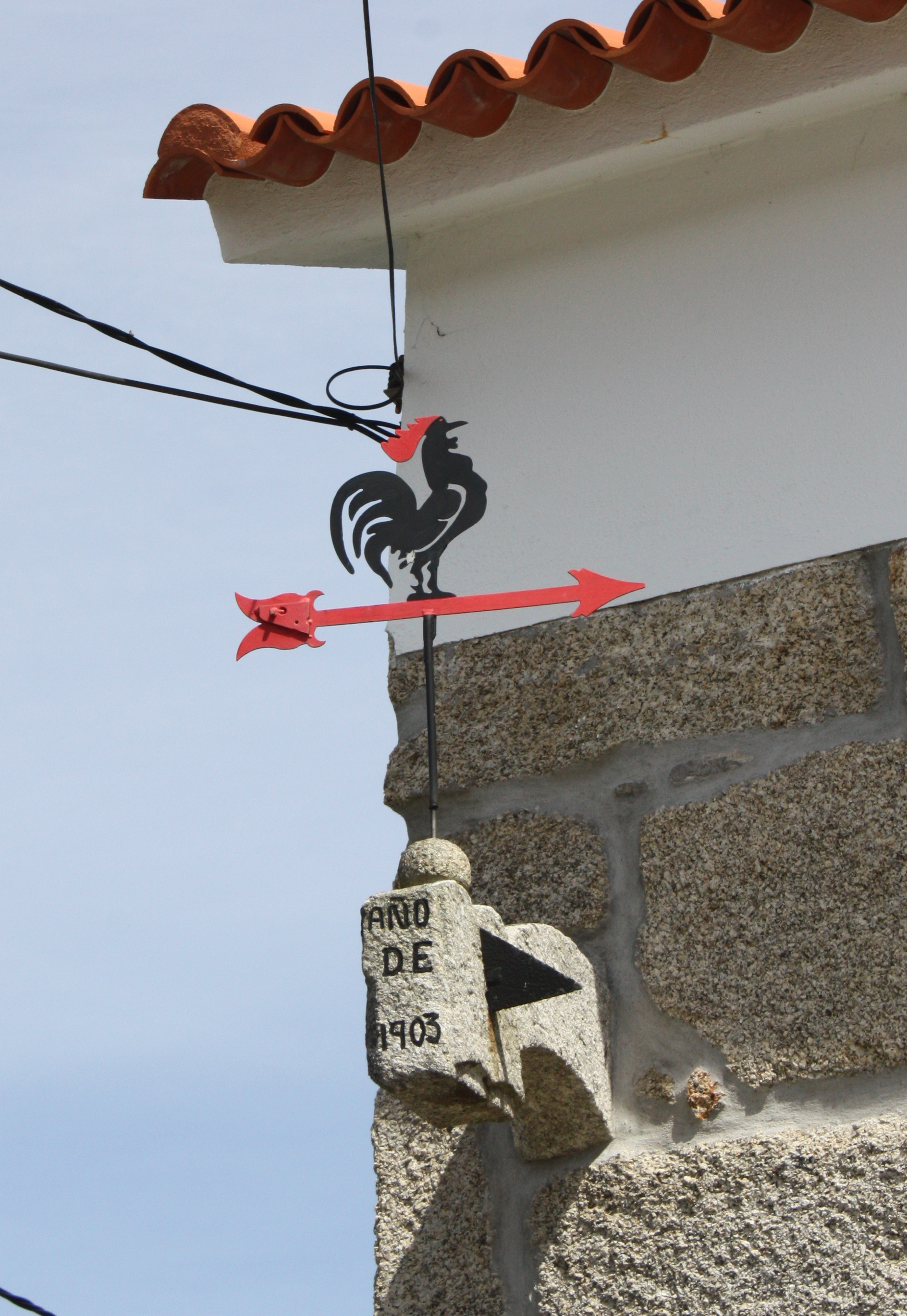 Cataventos sobre un reloxo de sol, en San Vicente do Grove (O Grove, Pontevedra)